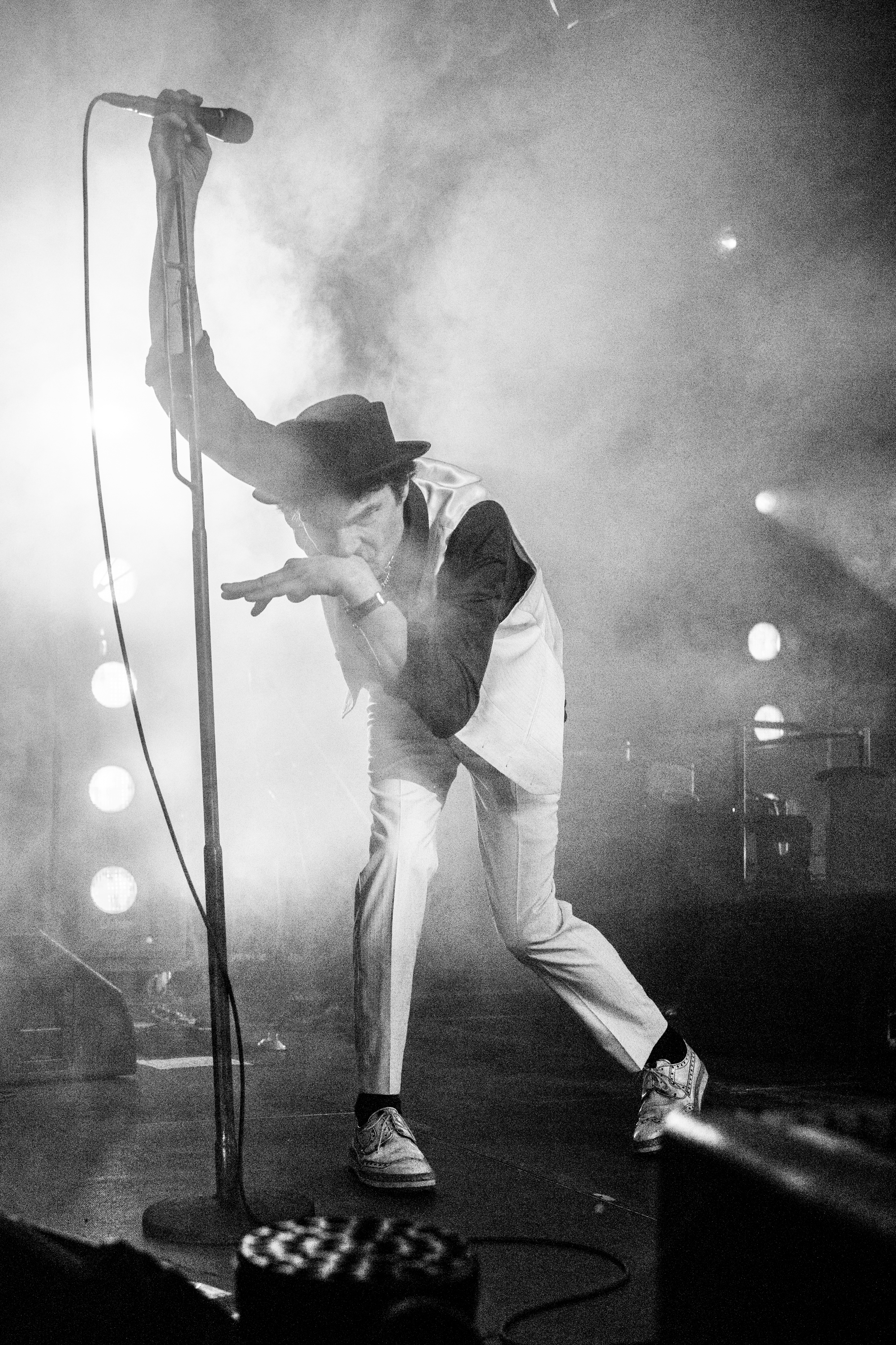 Konsert i Uppsala, Svandammshallarna, 2015 Thåström spelar